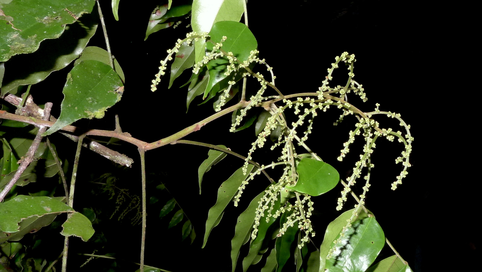 Picramnia glazioviana Engl.